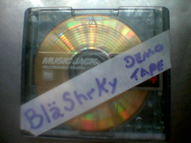 Bläshrky Original Demotape